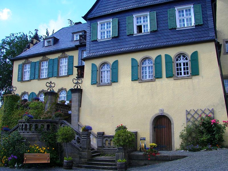 Schloss Heinersreuth, einem Ortsteil von Presseck